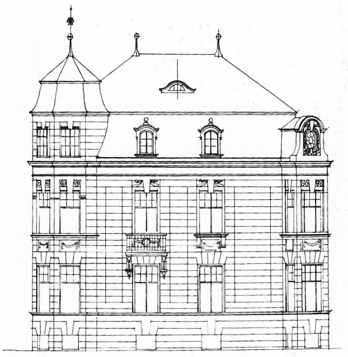 Villa Eschbaum, Tempelstraße 8, Bonn-Gronau: Zeichnung zum Bauantrag, Aufriss der Straßenfront (zur Wörthstraße, heute Tempelstraße)